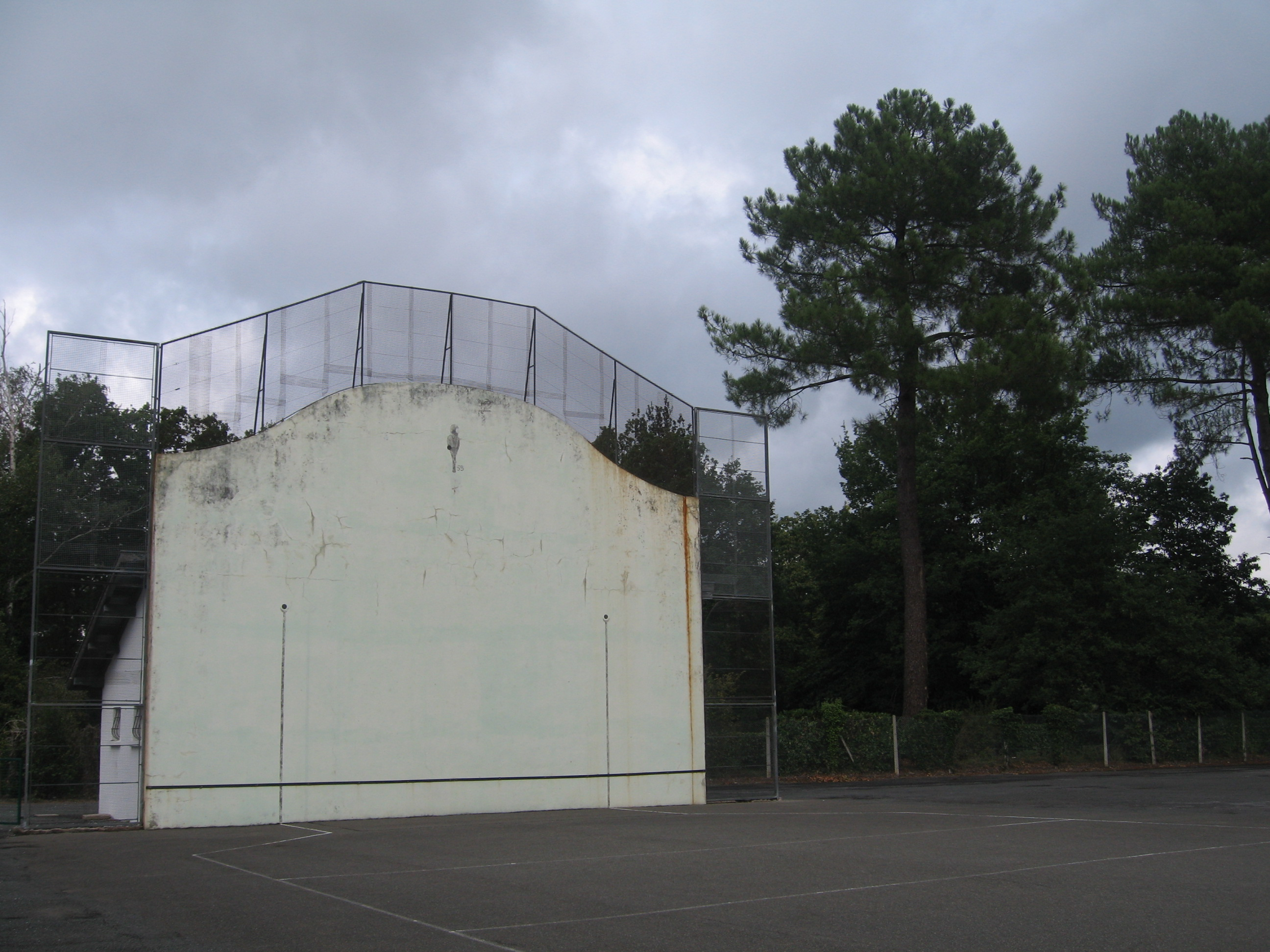 Fronton de Saint-Martin-de-Seignanx (quartier neuf), Landes (40), France